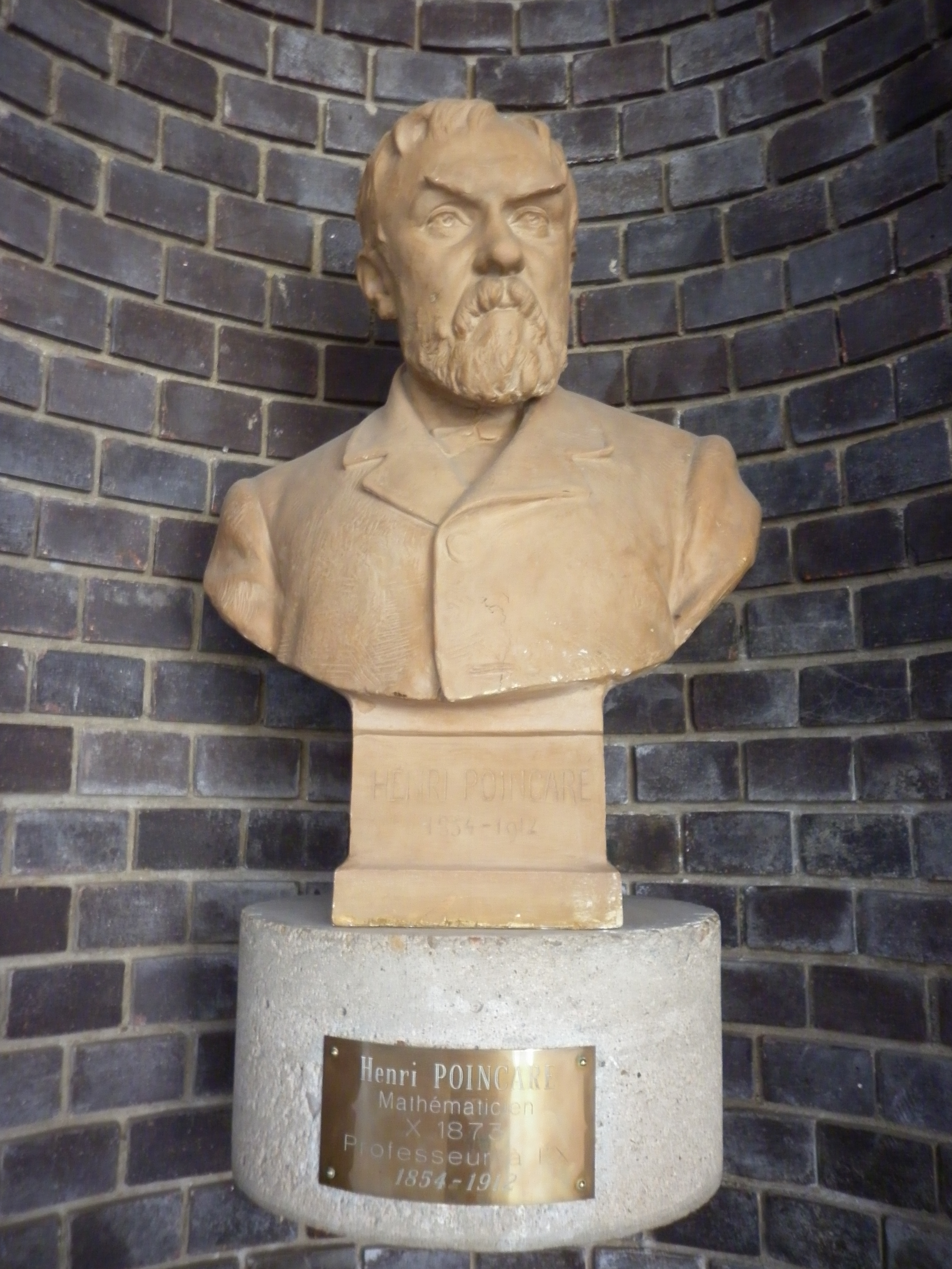 Buste de 1909 d'Henri Poincaré (par Joseph Carlier), offert par sa veuve à l'École polytechnique en 1916 - situé dans le hall principal de l'X à Palaiseau (collections BCX Bibliothèque de l'école)